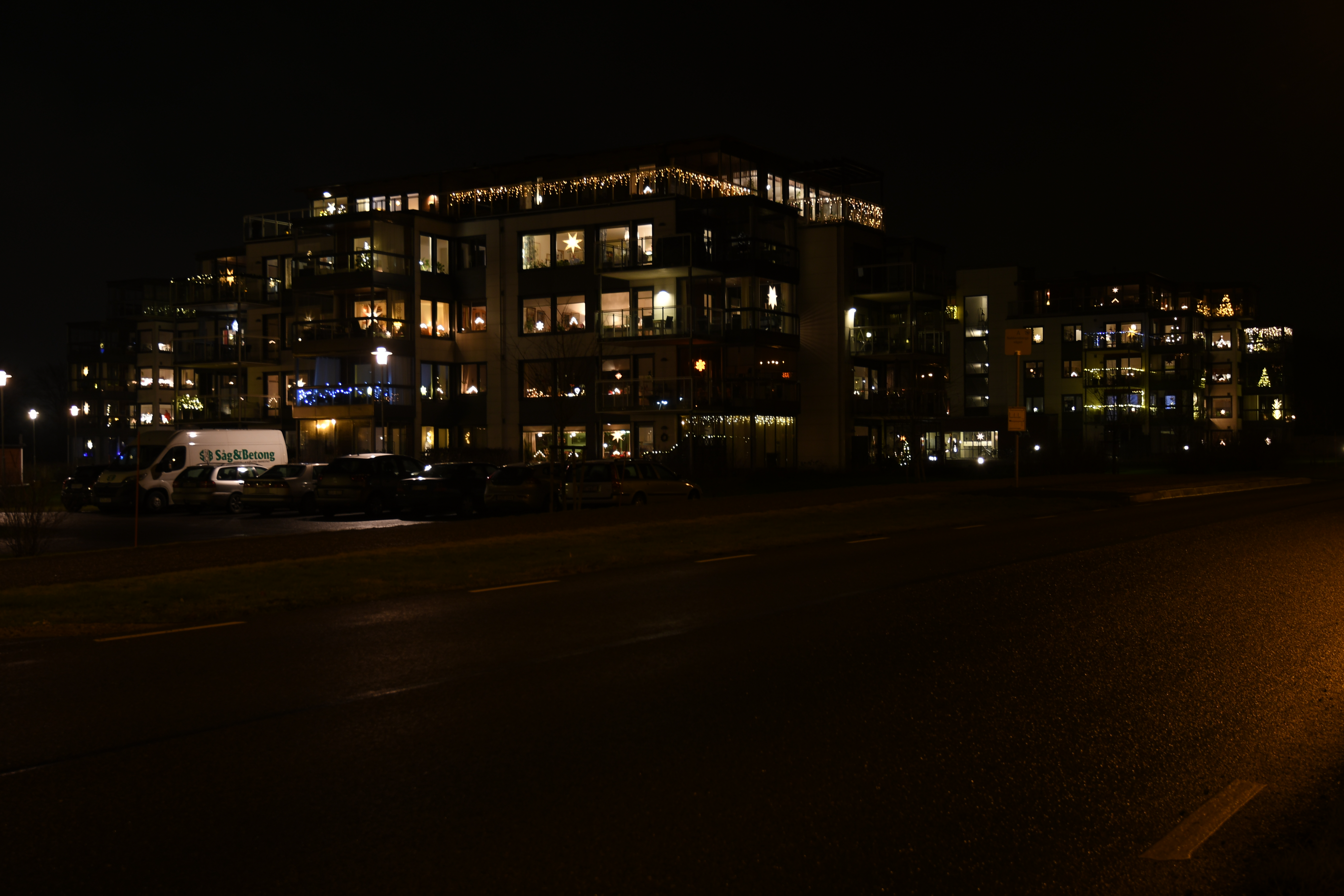 Adventsbelysning i Vänersborg.